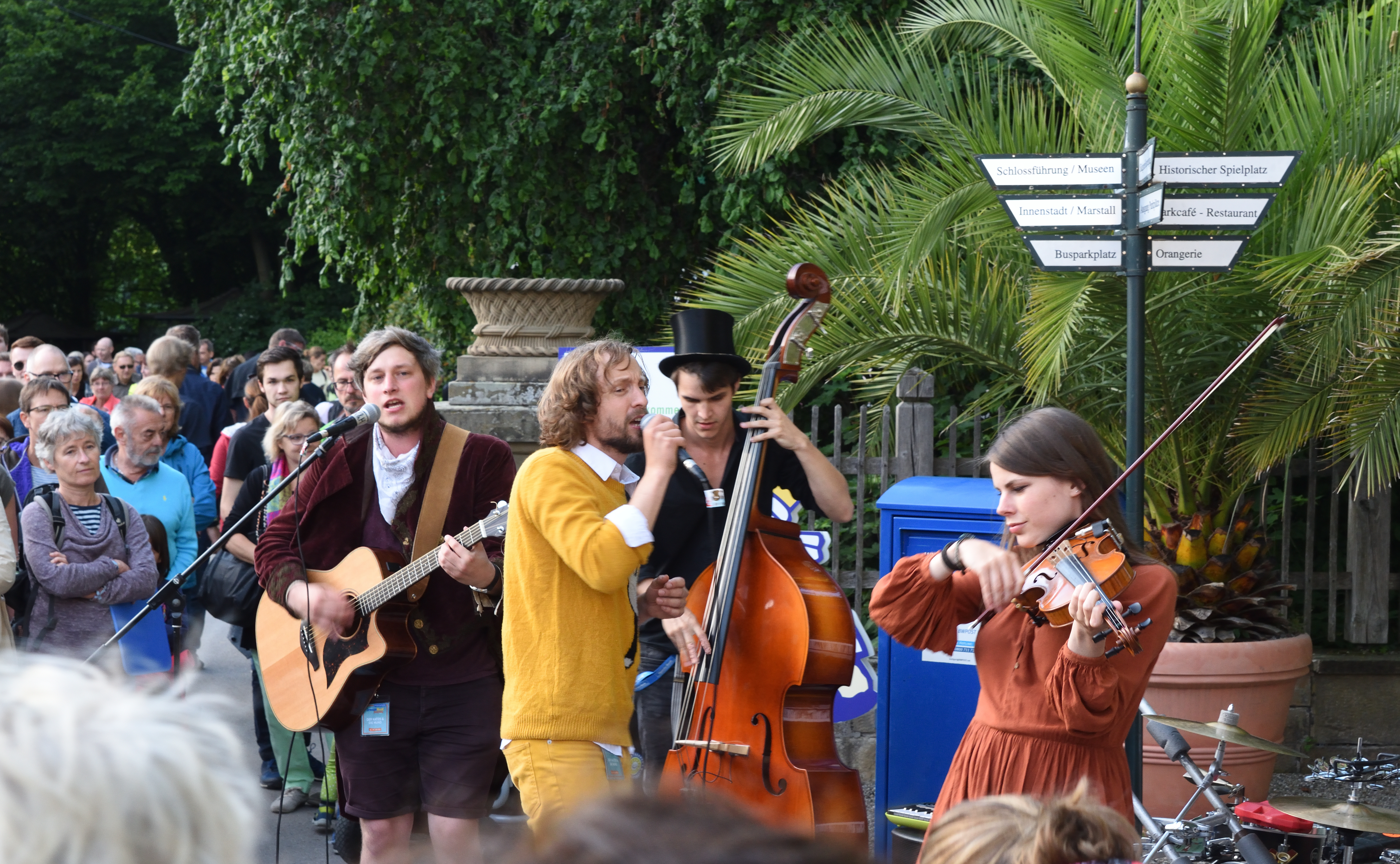 Straßenmusikfestival Baden-Württemberg 2019